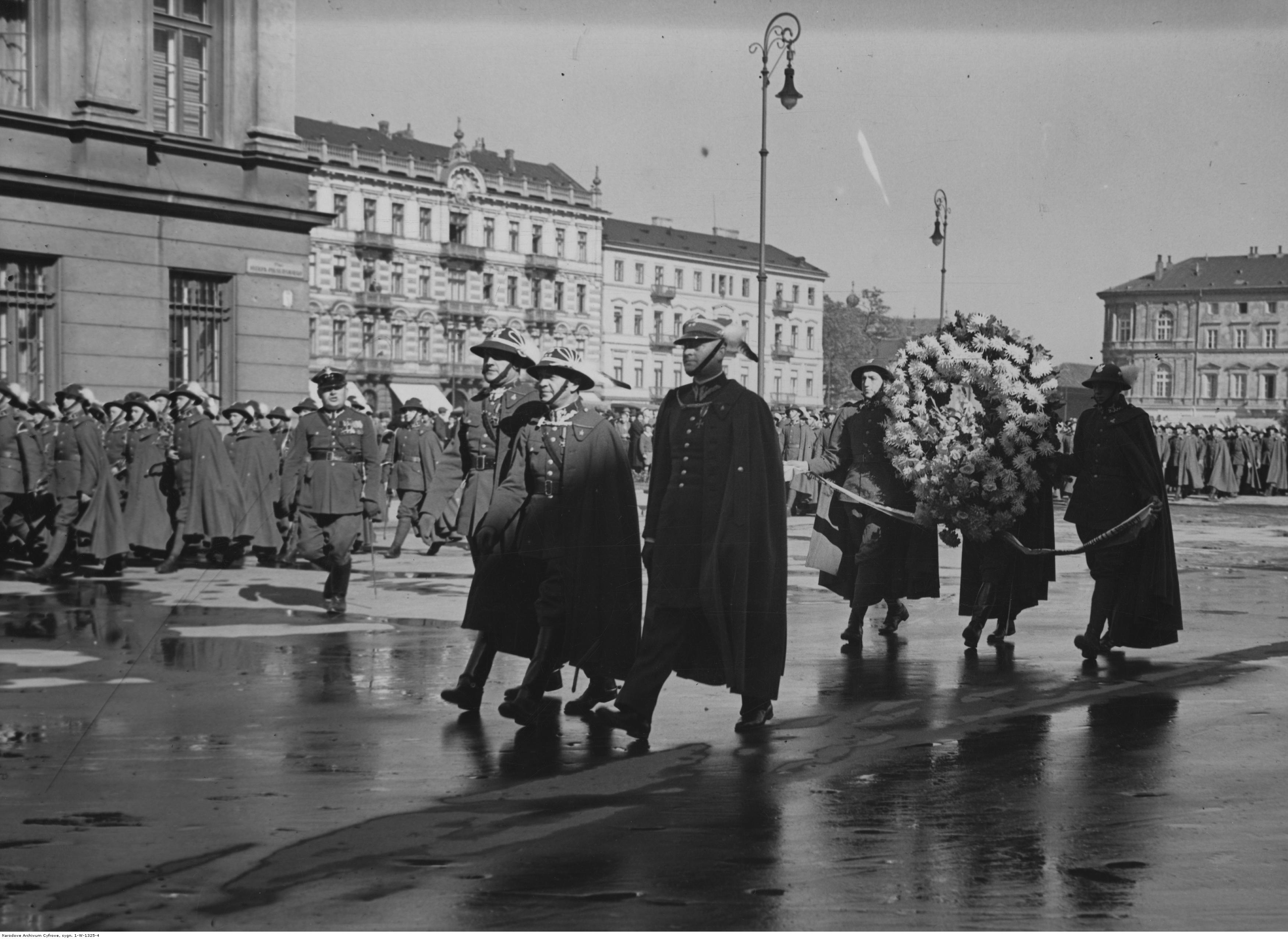 Wizyta 5 Pułku Strzelców Podhalańskich w Warszawie Delegacja Pułku z wieńcem zbliża się do Grobu Nieznanego Żołnierza. Koncern Ilustrowany Kurier Codzienny - Archiwum Ilustracji. Sygnatura: 1-W-1325-4